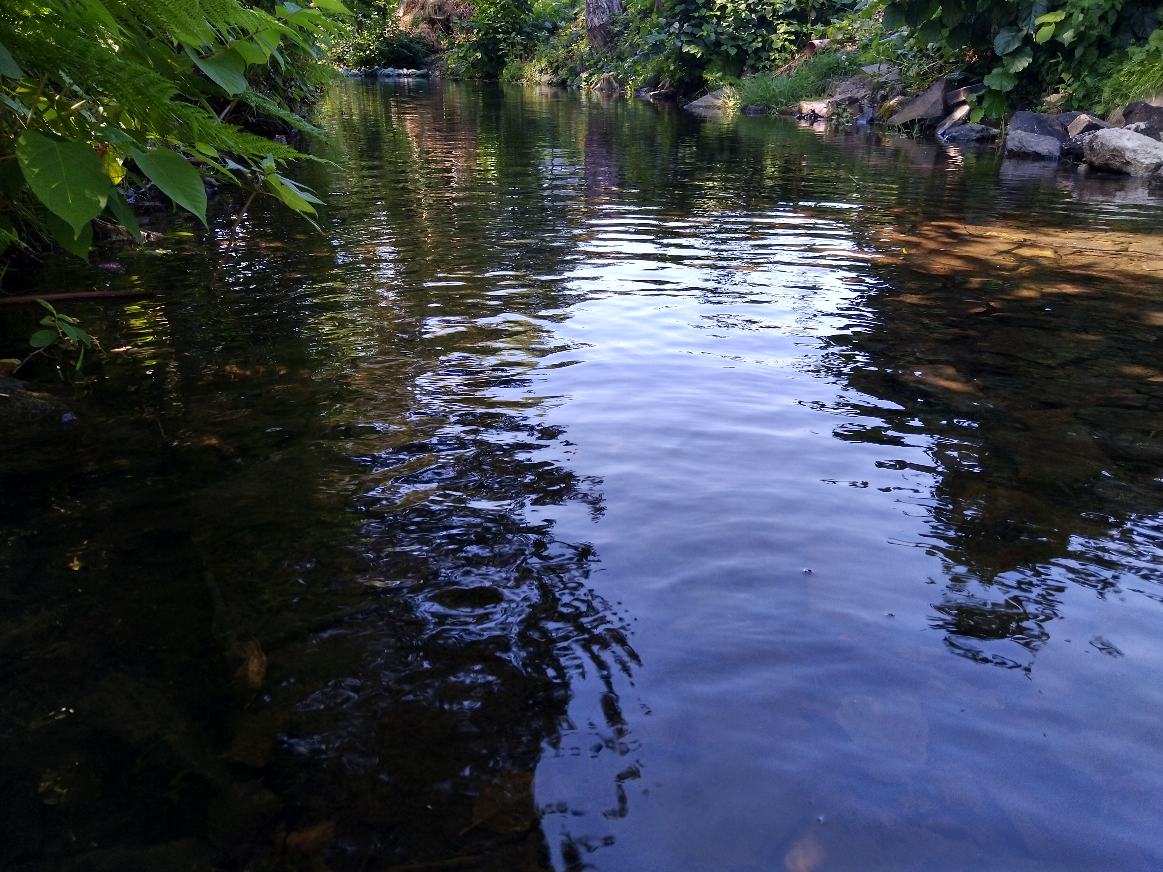 Aubach am Weiherdamm im Sommer